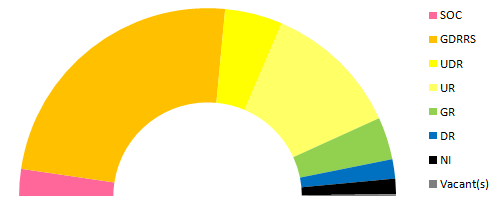 Répartition des sénateurs suivant leur groupe parlementaire après les élections sénatoriales de 1927.